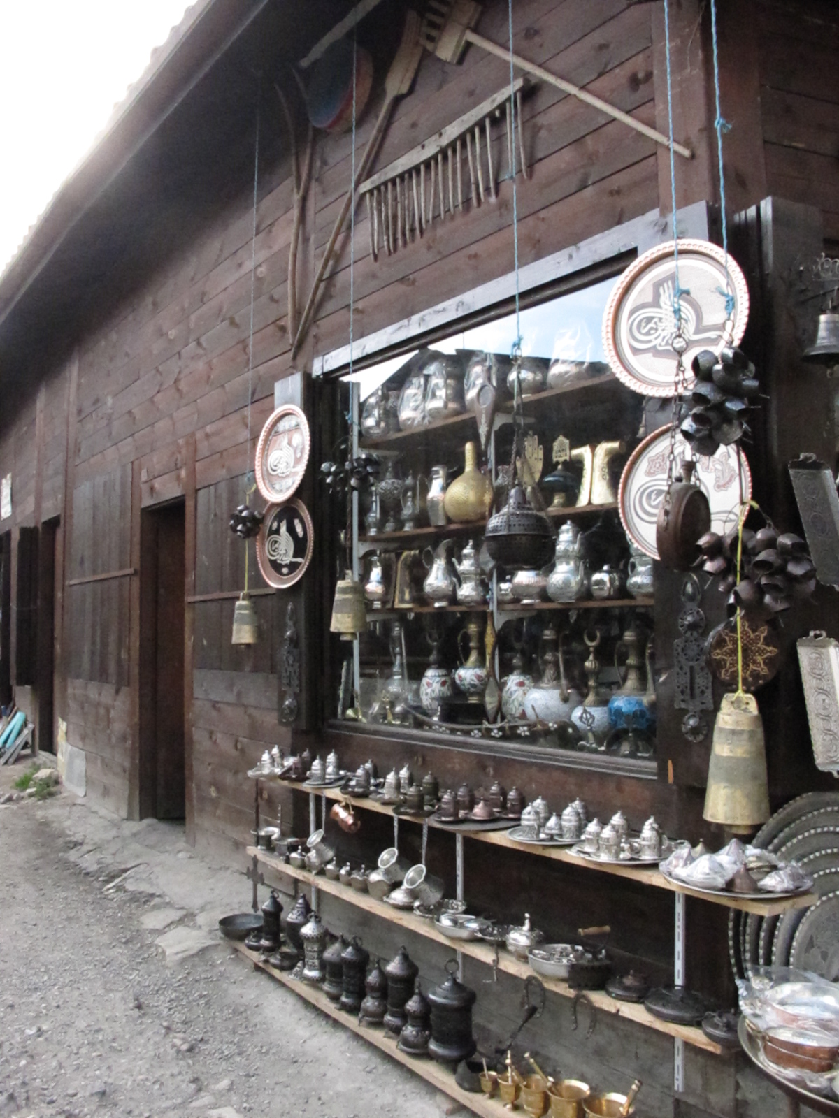 番紅花城手工鐵器